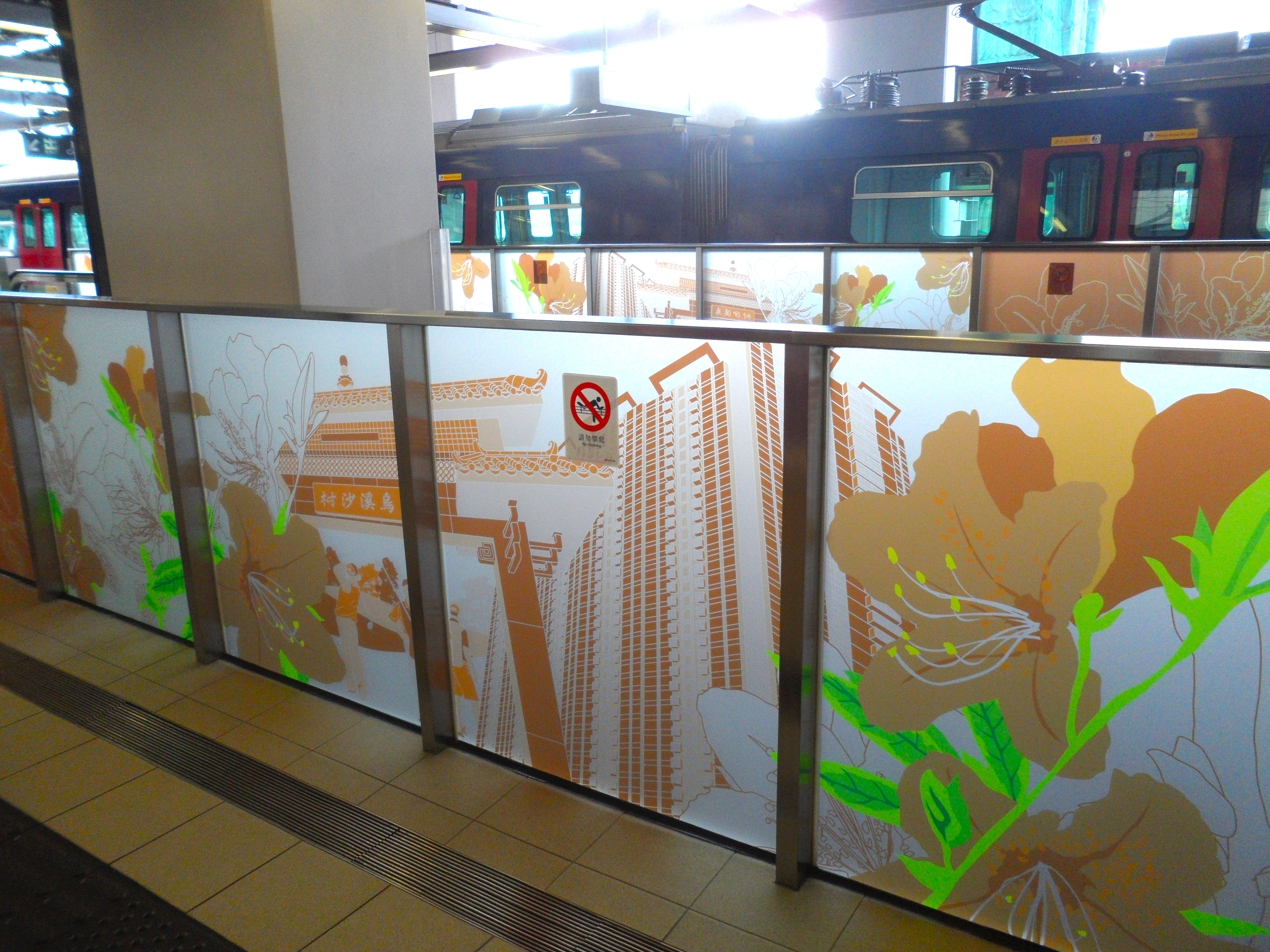 港鐵烏溪沙站月台佈置